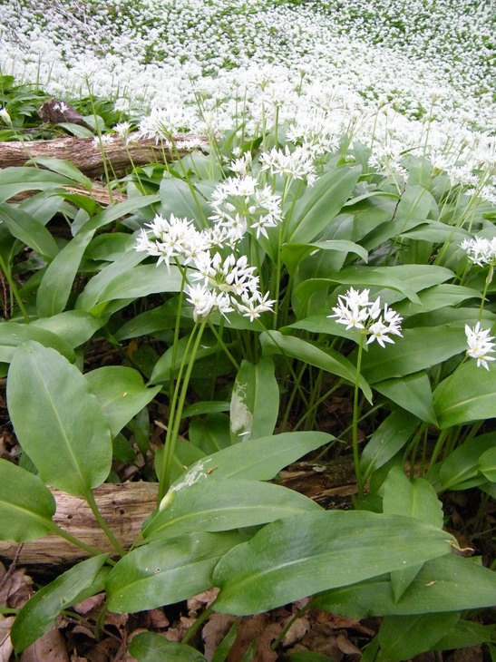 Ail des ours (Allium ursinum), forêt de Crécy (Somme), mai 2013